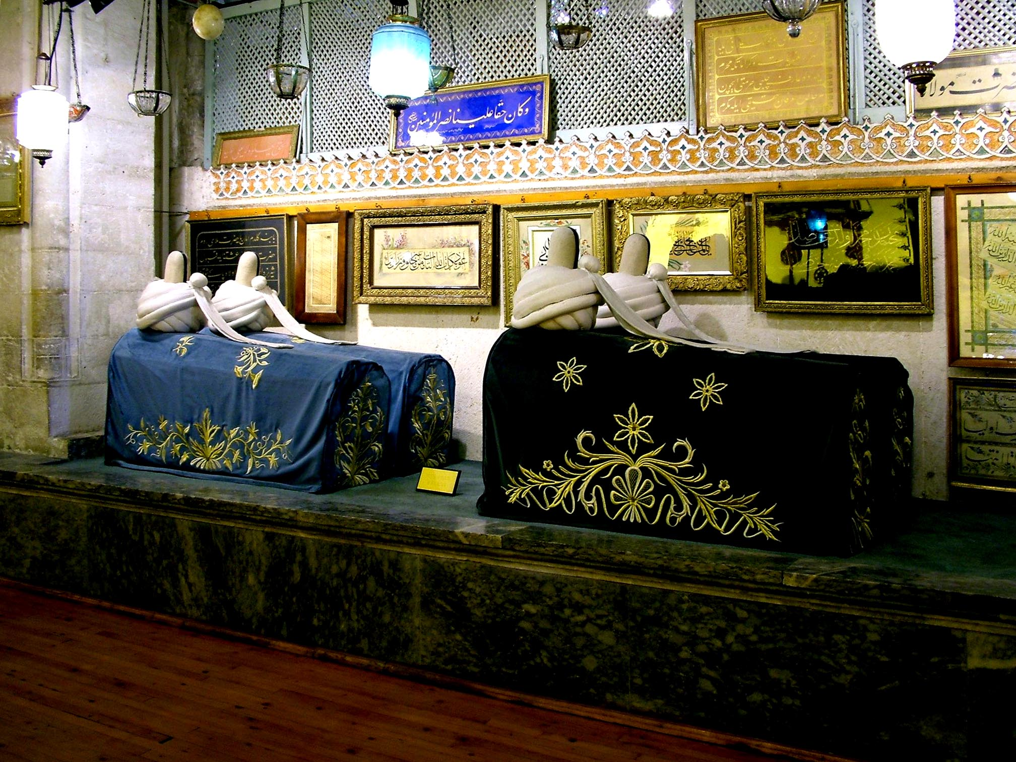 Mevlana Mauzóleum (Konya, Törökország)